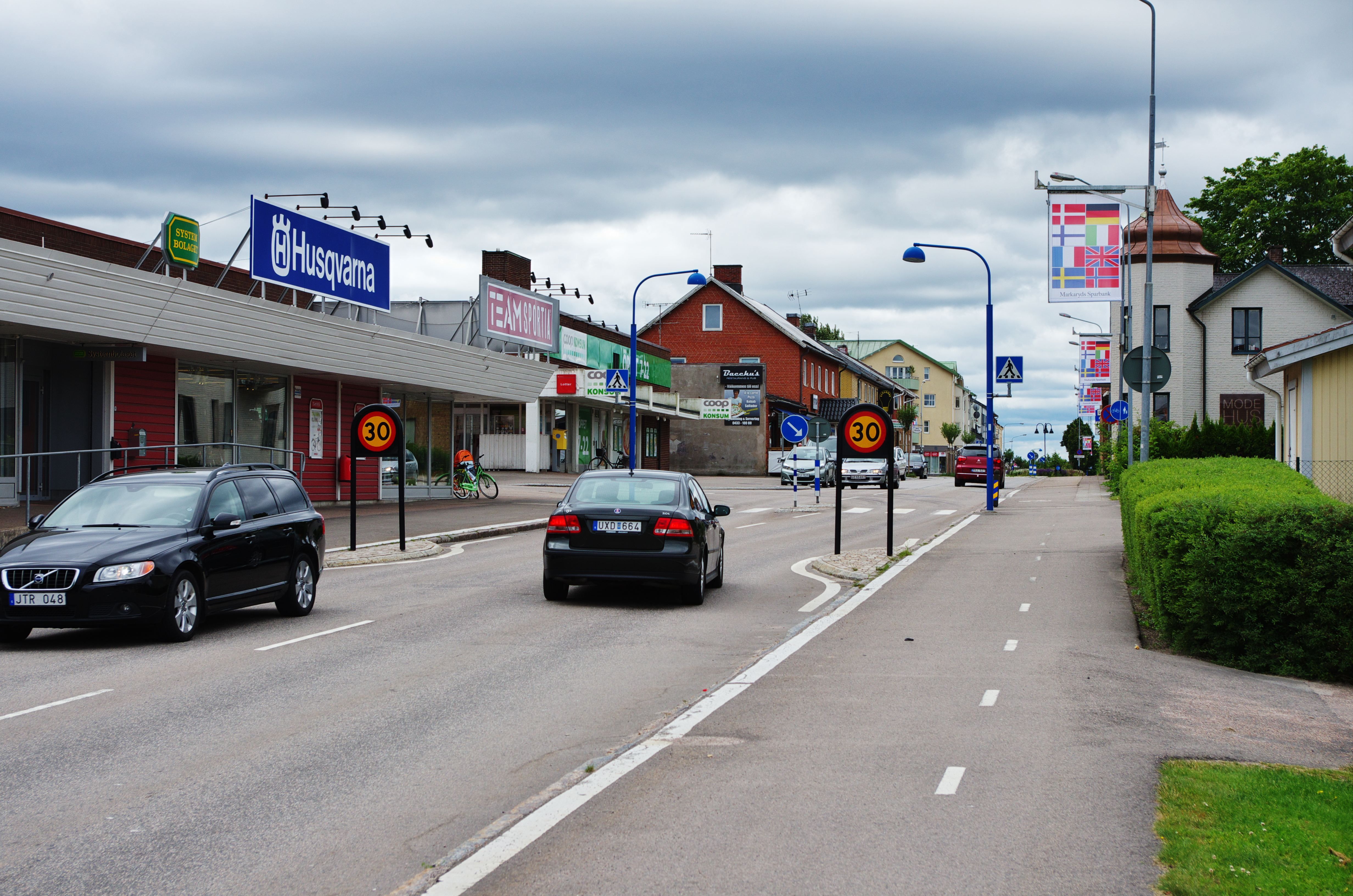 Markaryds centrum.